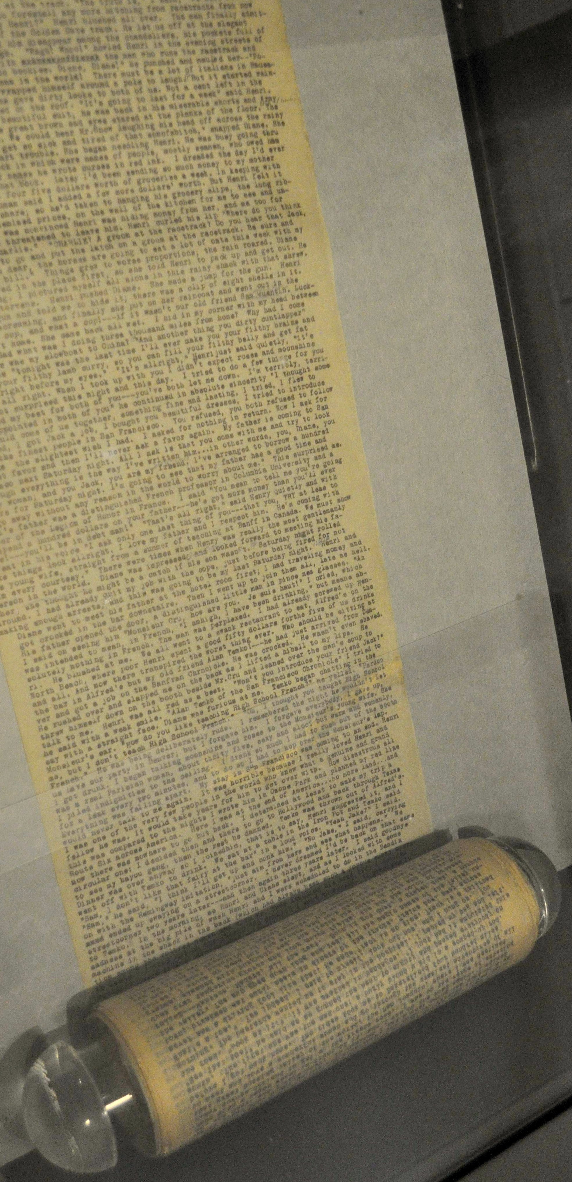 Partie du manuscrit de Sur la route par Jack Kerouac. Exposition "Sur la route deJack Kerouac : L'épopée, de l'écrit à l'écran" (16 mai - 19 août 2012) au Musée des lettres et manuscrits de Paris.